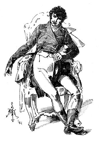 Ilustración de La segunda casaca de Benito Pérez Galdós; ilustrado por Mélida y Pellicer. Madrid, Administración de La Guirnalda y Episodios Nacionales, 1884, pp. 1-214.